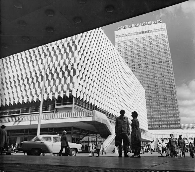 ADN-Zentralbild 21.9.73 Deutsche Demokratische Republik: Berlin - Hauptstadt der DDR: Blick auf das sechsgeschossige Centrum-Warenhaus (links) und das 39 stöckige Hotel Stadt Berlin am Alexanderplatz. Reporter: Müller Copyright: ADN-Zentralbild